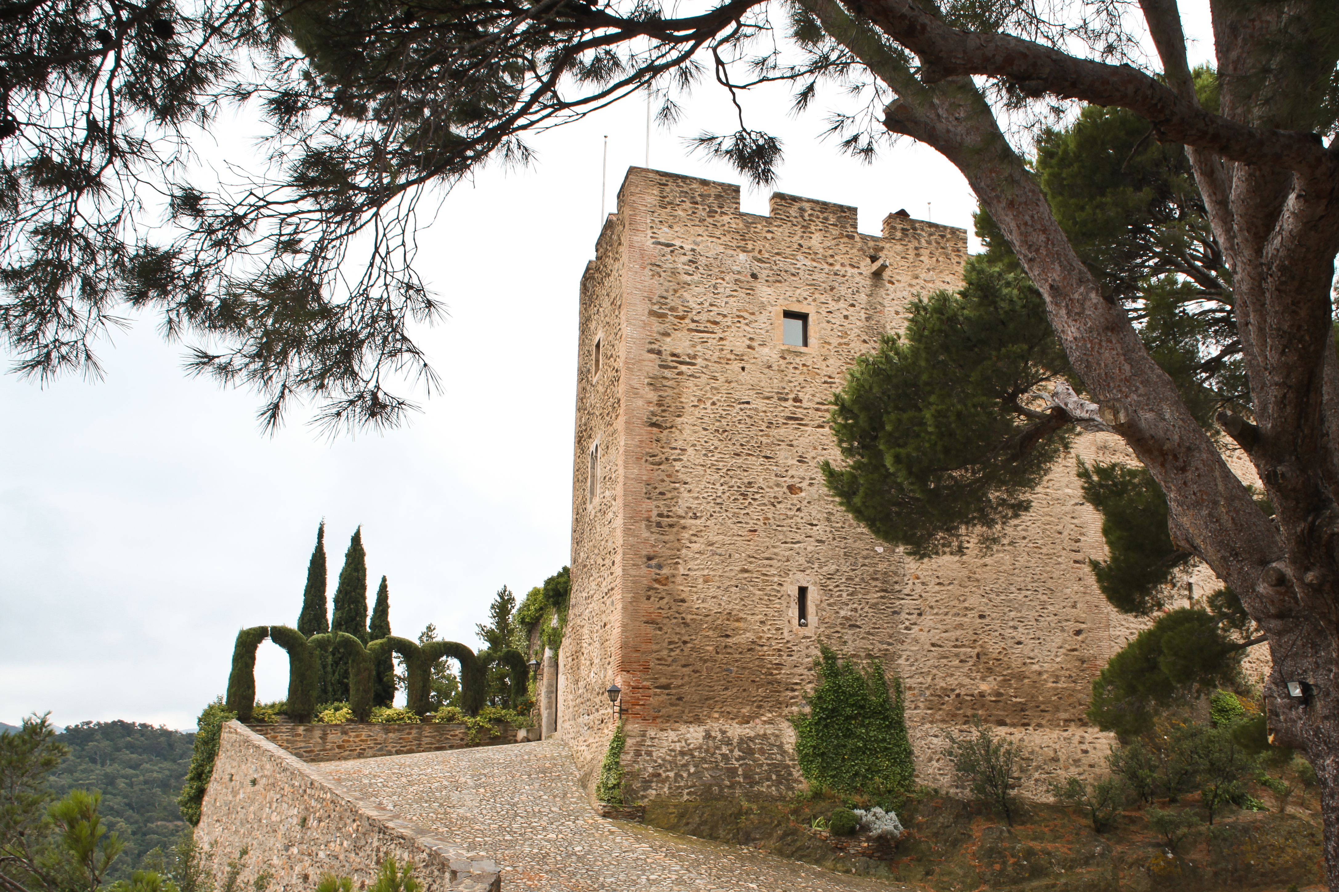 Château de Corbère (Inscrit)